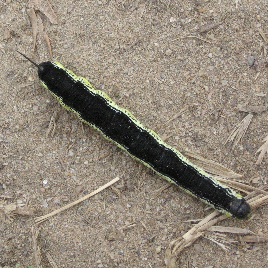 Catalpa Sphinx (Ceratomia catalpae), caterpillar.